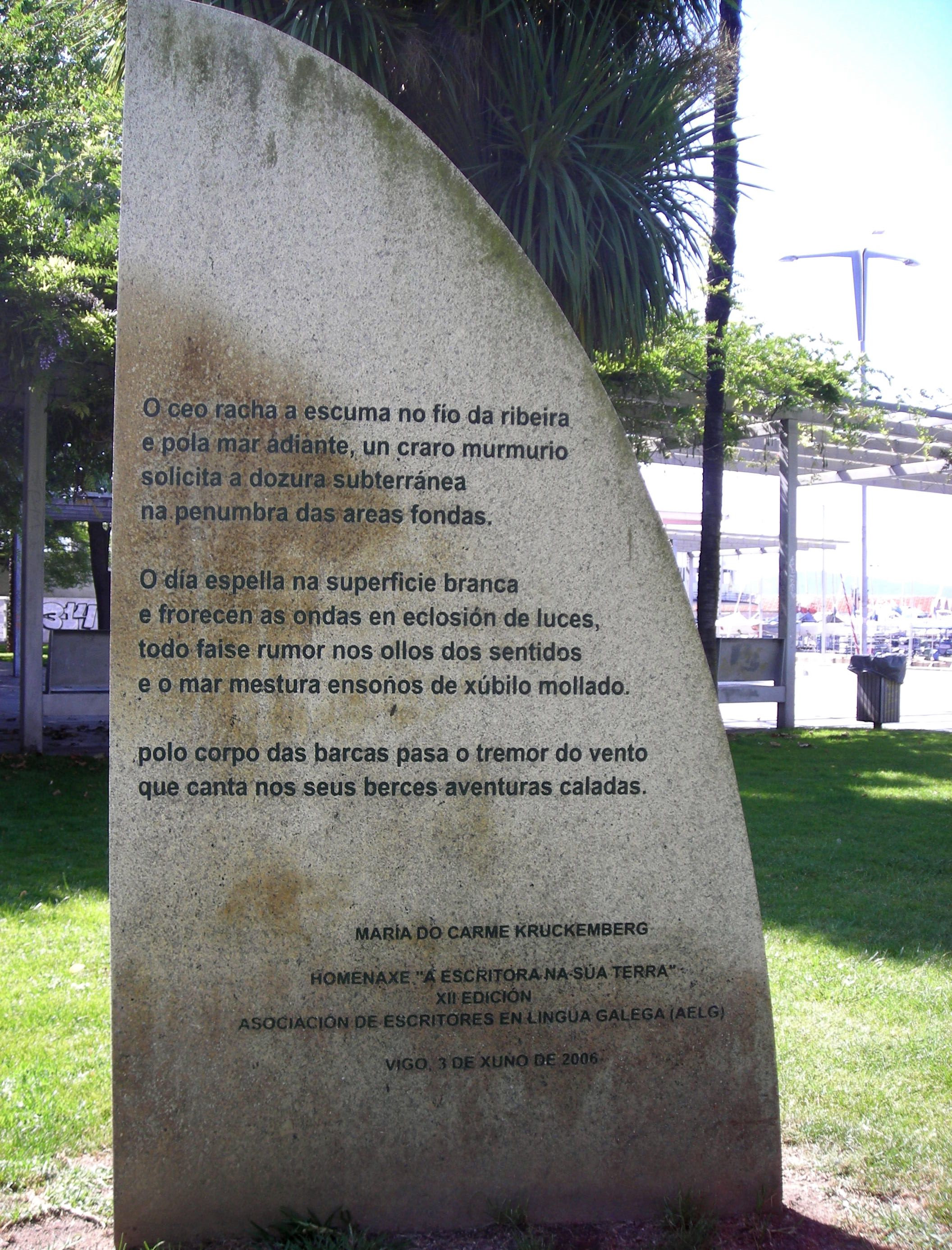 Monumento en homenaxe a María do Carme Kruckenberg no Náutico de Vigo.